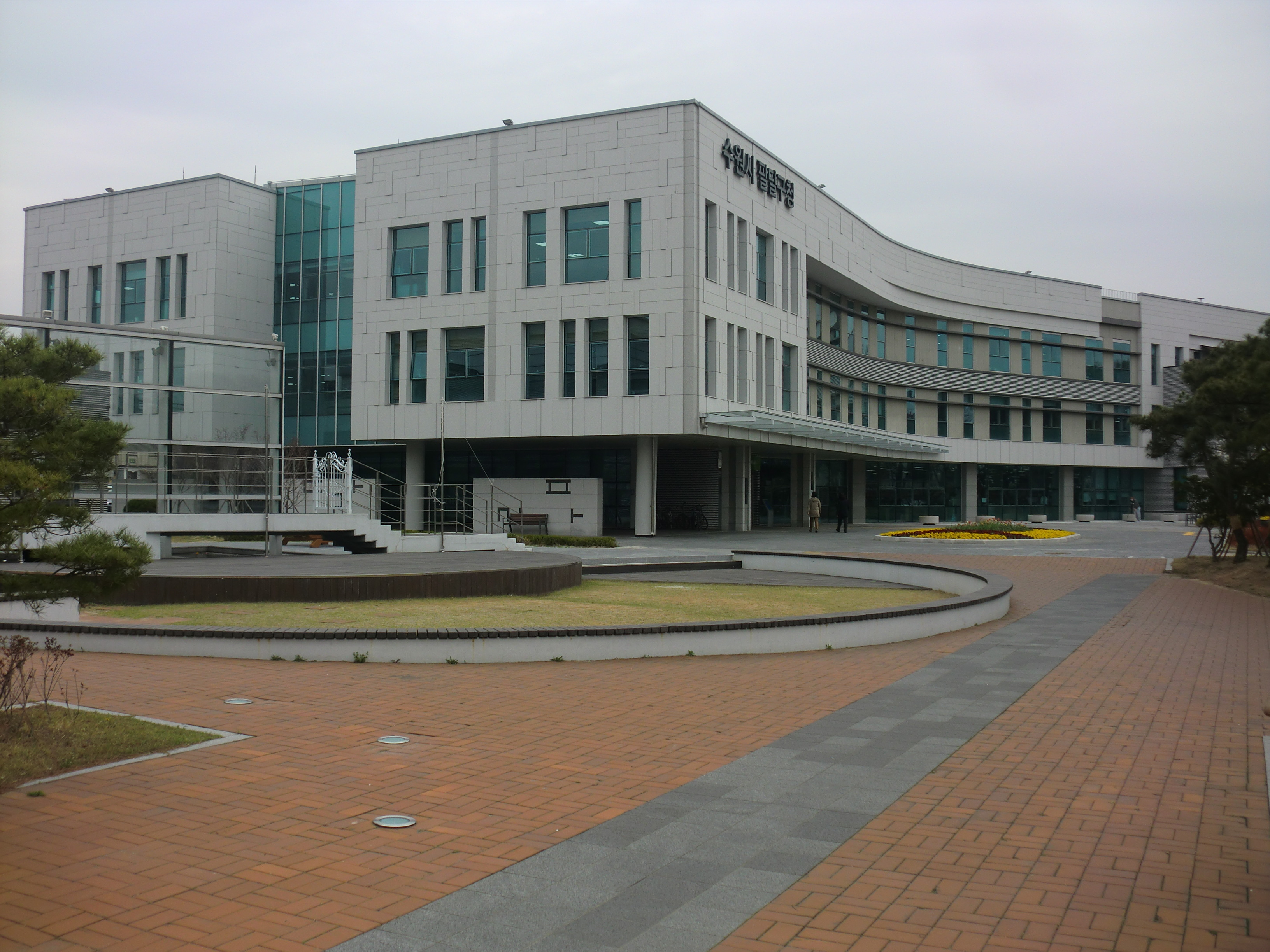 경기도 수원시에 있는 팔달구청